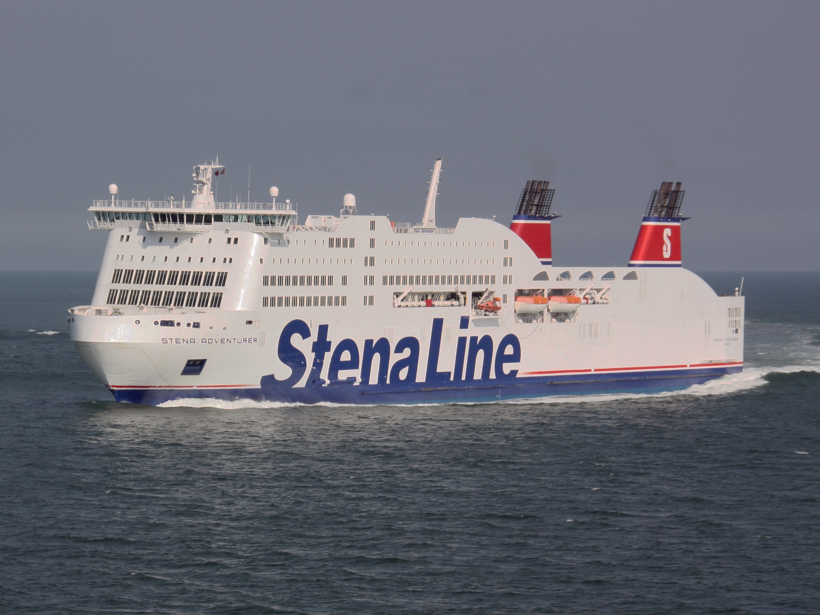 Stena Adventurer IMO Number: 9235529 MMSI Number: 235667000 Callsign: VQLZ4 Length: 211 m Beam: 30 m